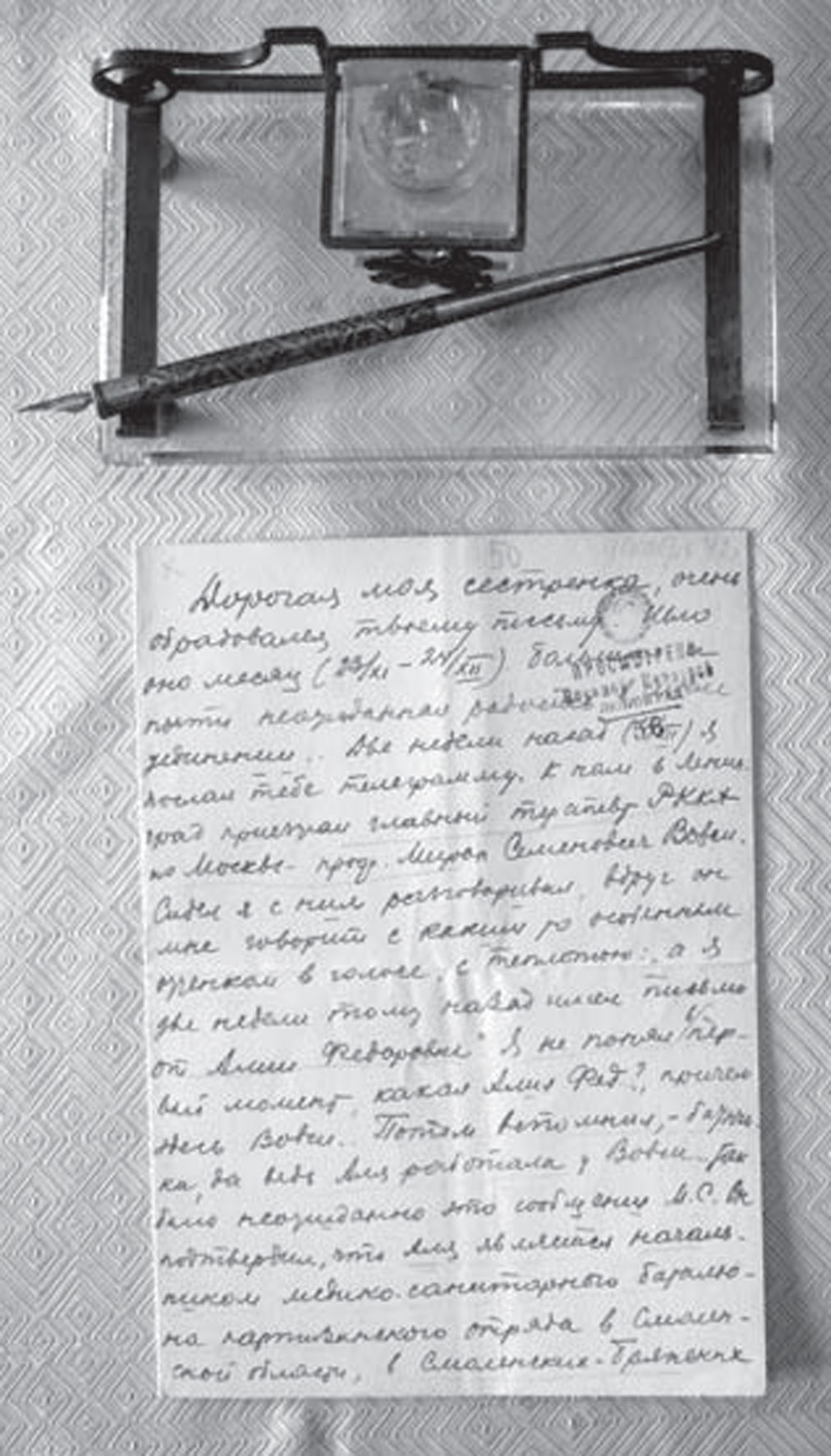 Aliyə Rüstəmbəyovaya məxsus mürəkkəbqabı və gümüş qələm